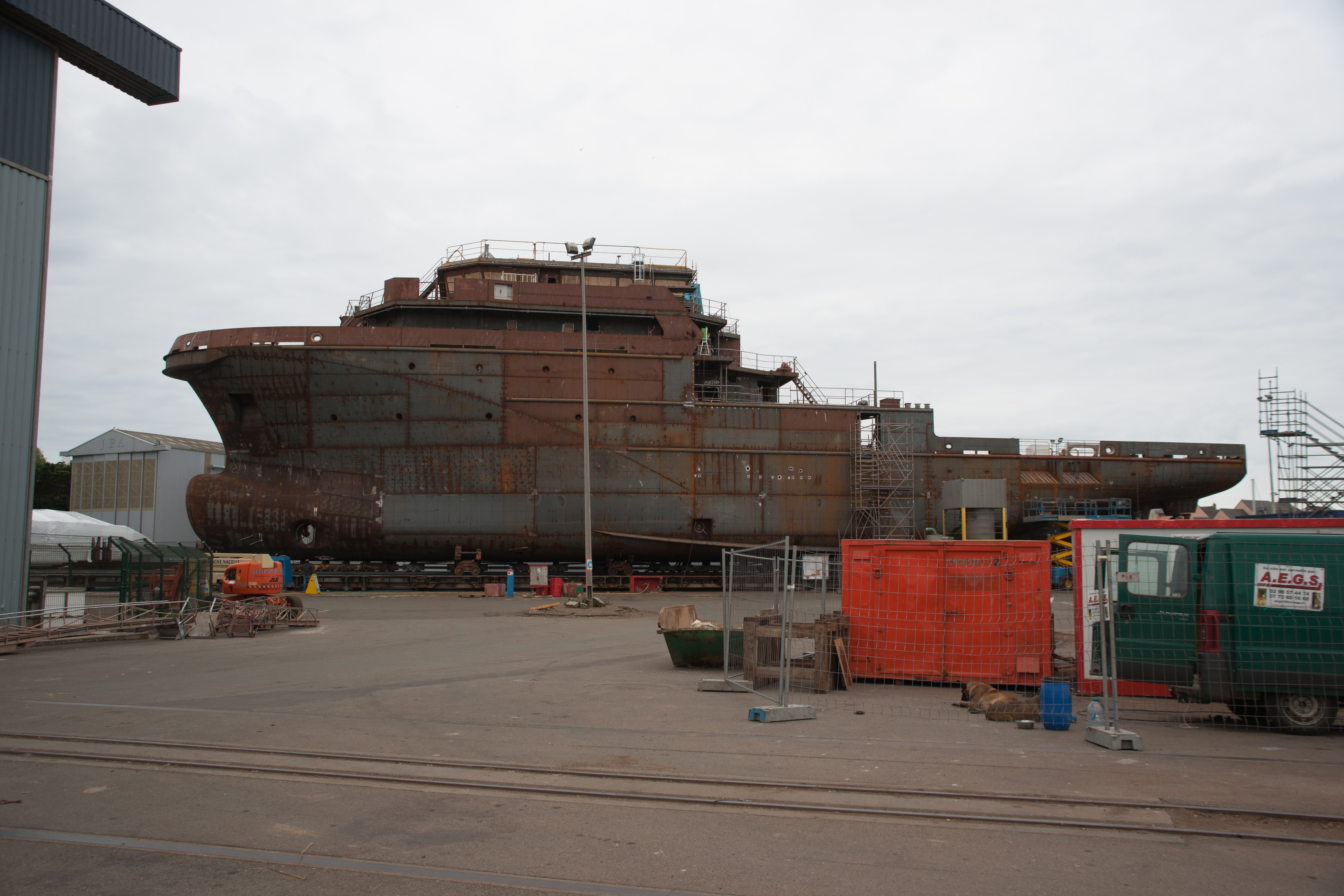 Le B2M D’Entrecasteaux à Concarneau lors de sa construction en mai 2015.